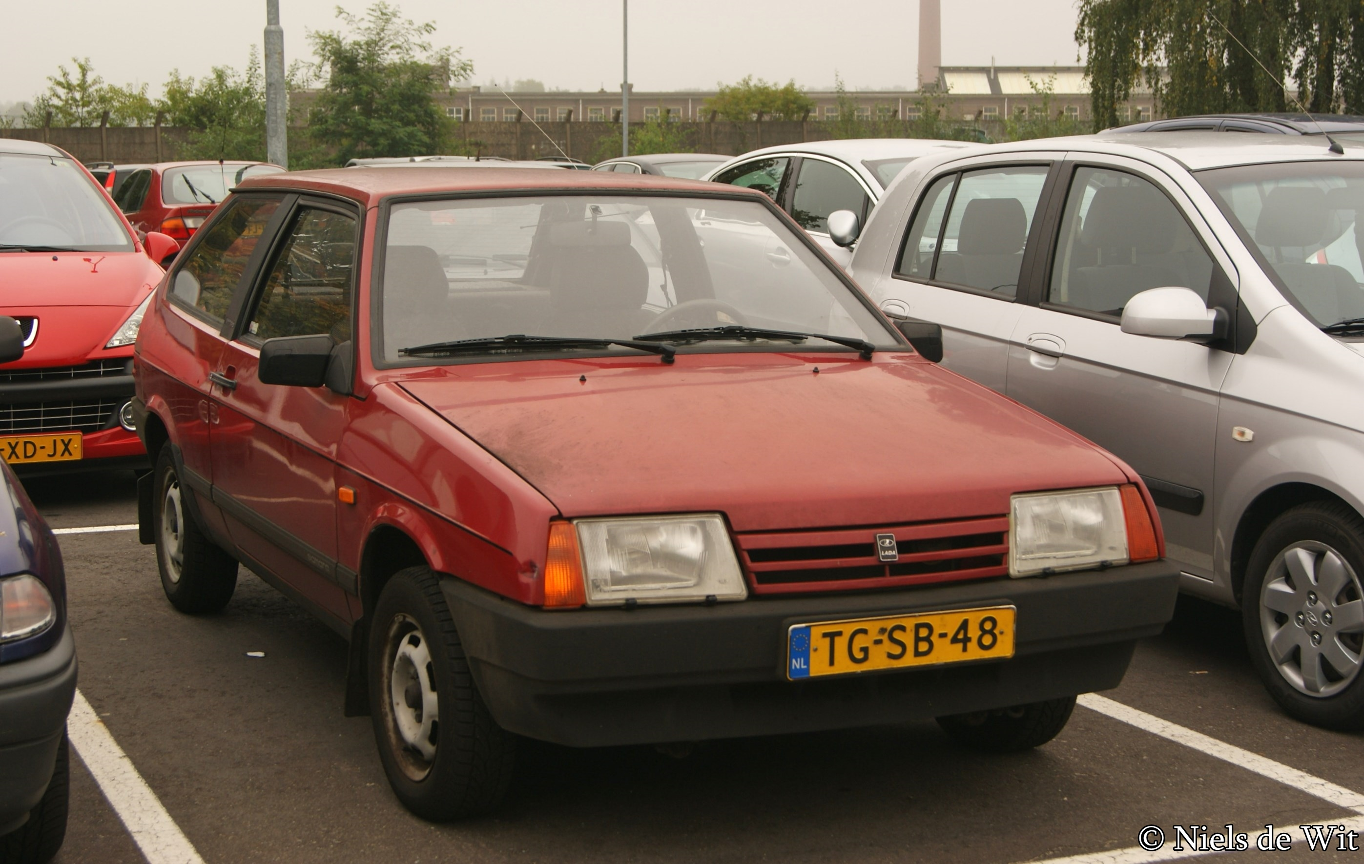 TG-SB-48